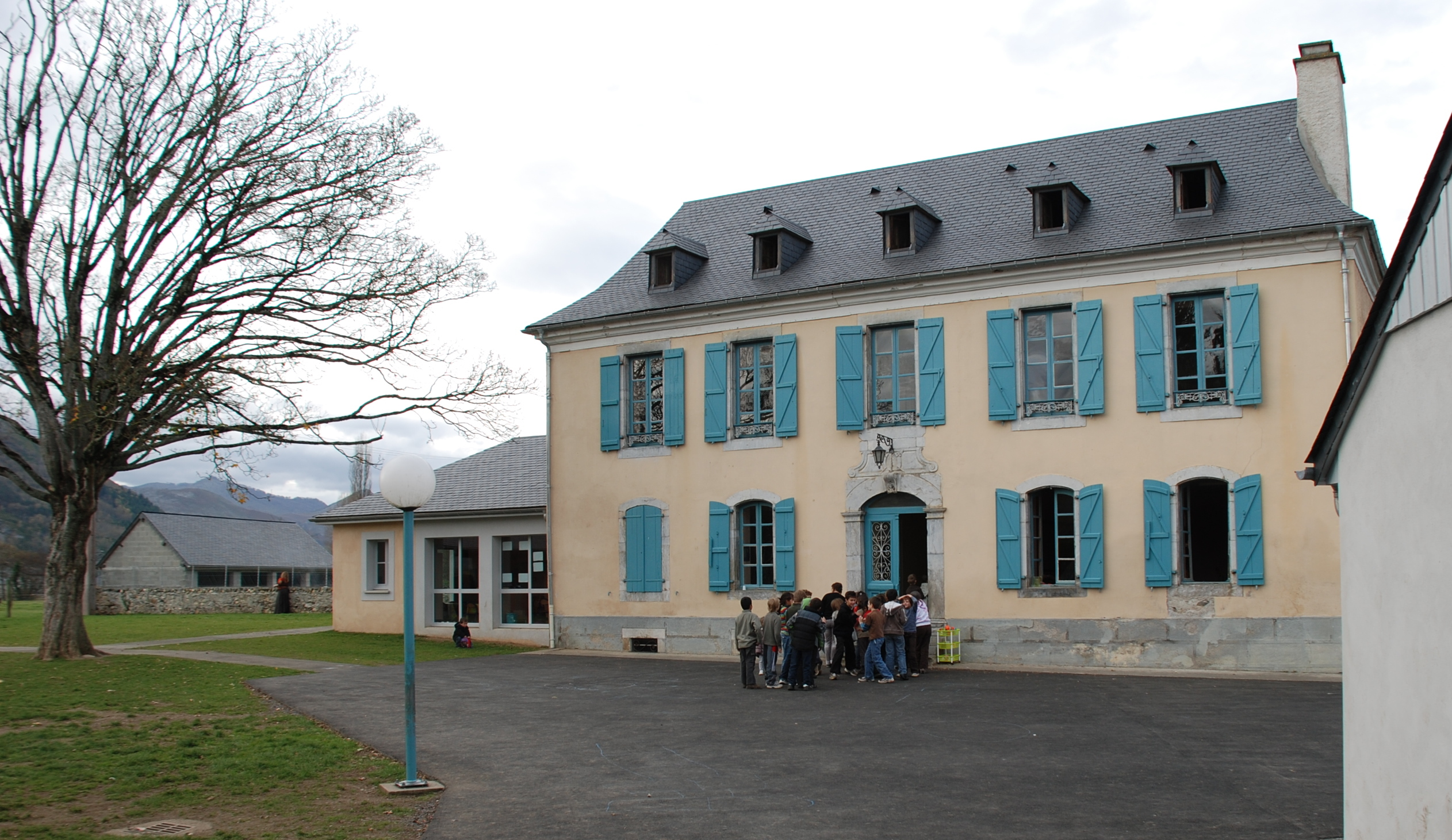 Groupe scolaire de la communauté de communes de la Baronnie des Angles à Lézignan, Hautes-Pyrénées. Ce bâtiment très représentatif d'une ancienne maison de maître bigourdanne est l'ancien presbytère de Lézignan. Le lieu dit, proche de l'église, est Abbadia, ce qui évoque un lieu de résidence d'un abbé dans le passé